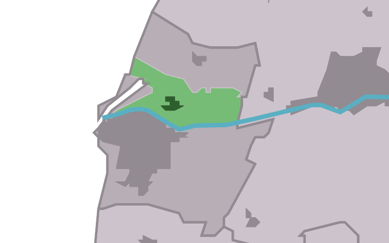 Kaartsje fan himrik fan Mullum